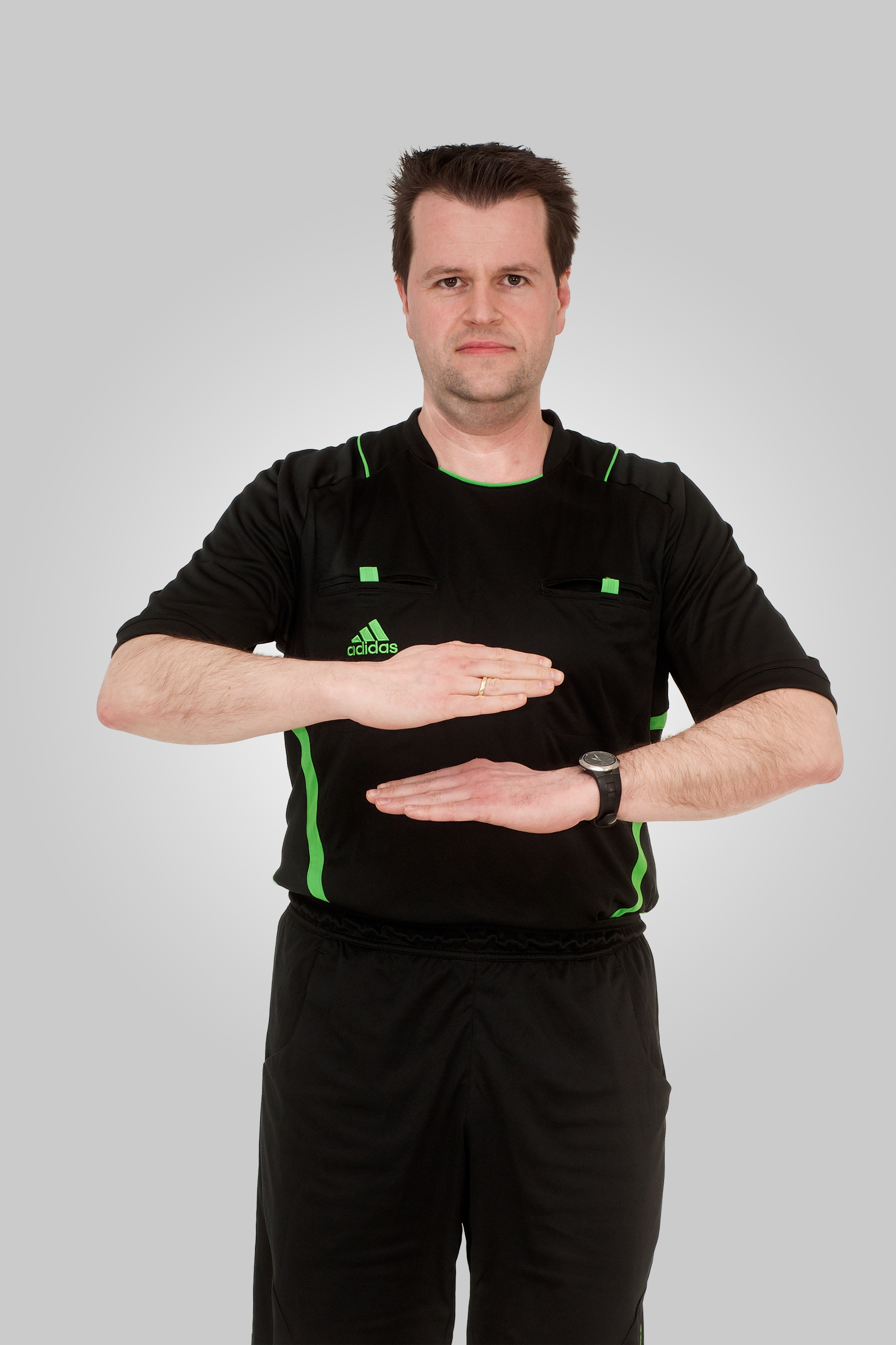 Internationale Handballregeln Handzeichen 03 Schritt- oder Zeitfehler